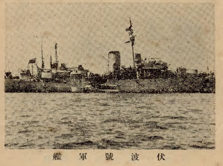 中國新海軍插圖